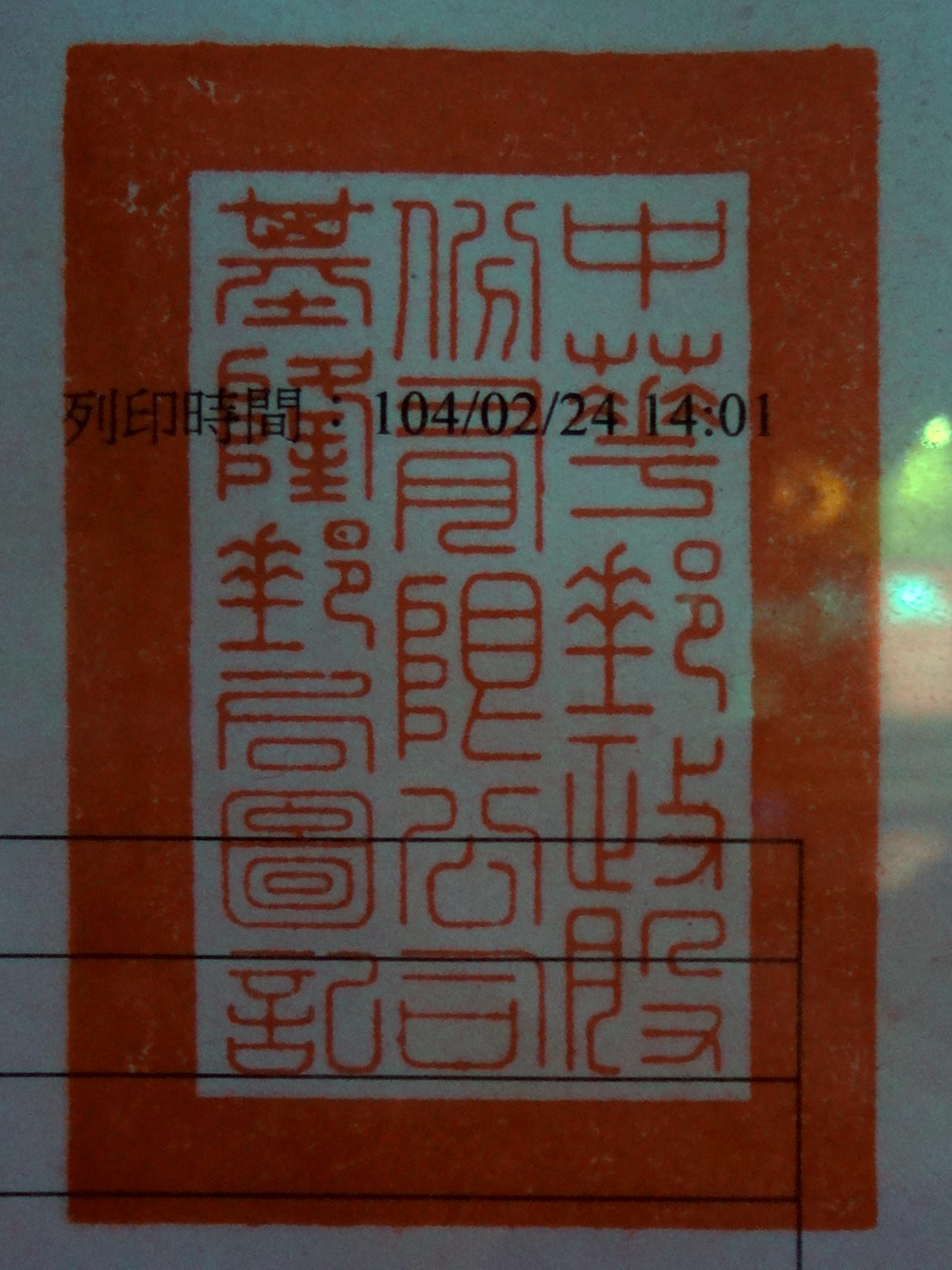 2015年2月24日蓋印的中華郵政基隆郵局圖記。